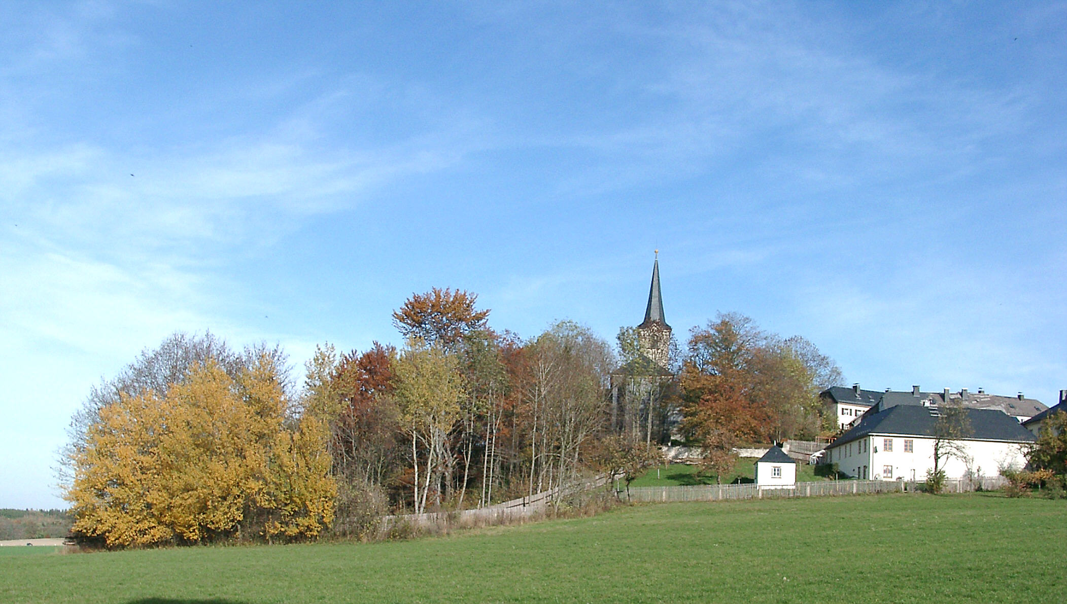 Kirche und Schlossberg Hallerstein im Herbst